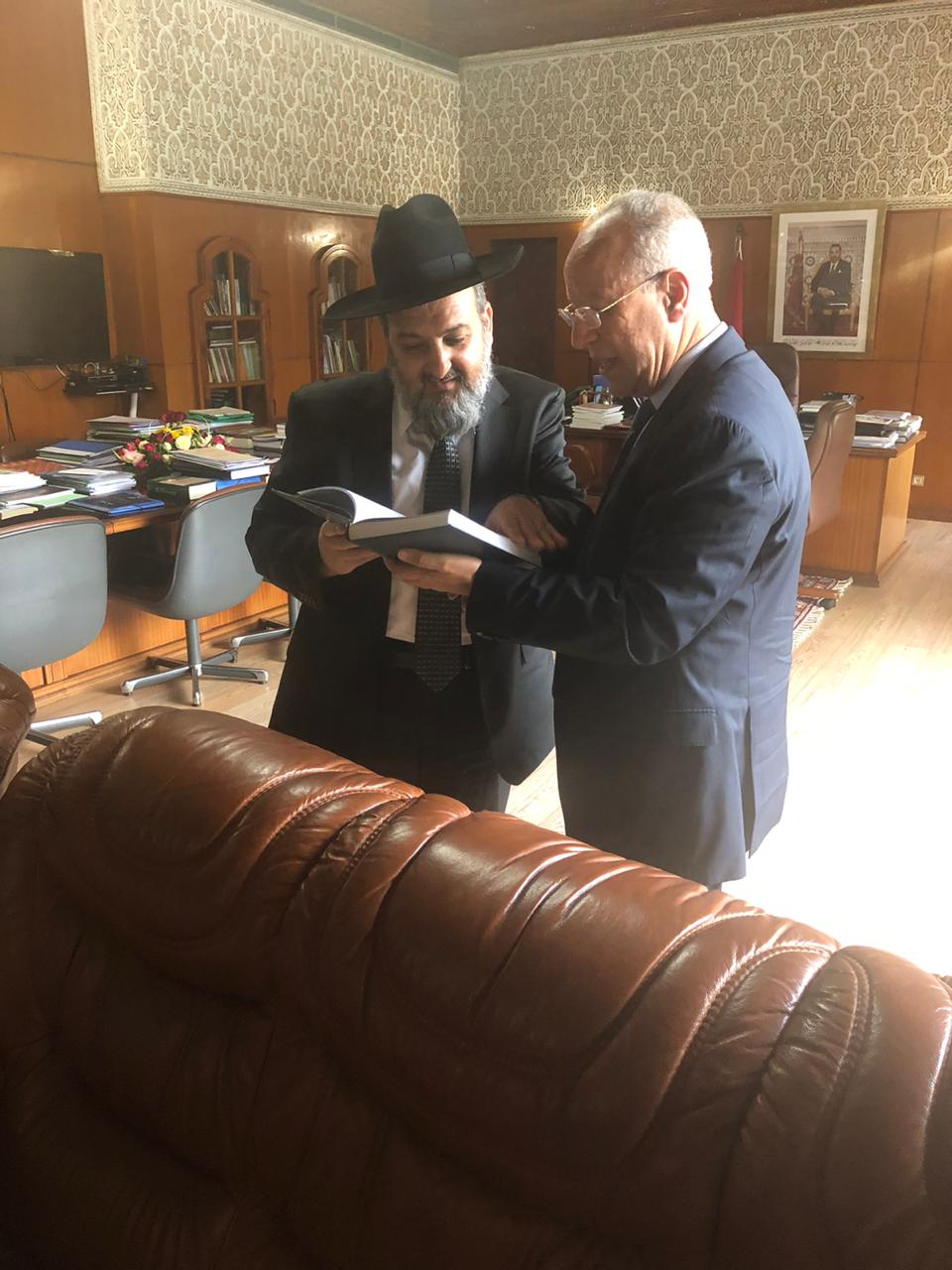 הגשת ספר המשפטים מבית הדין מראכש לשר הדתות המרוקאי